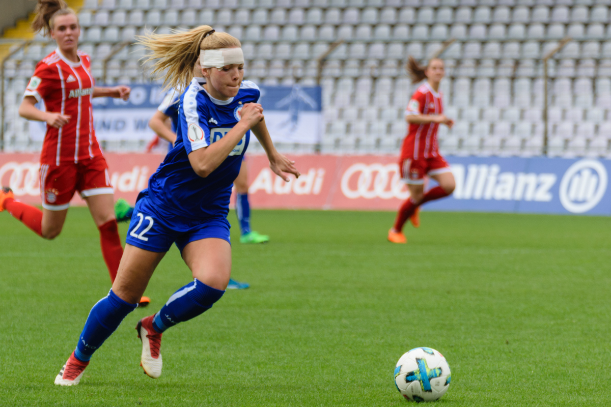 Nina Ehegötz vs Bayern Munchen - DFB-Pokal